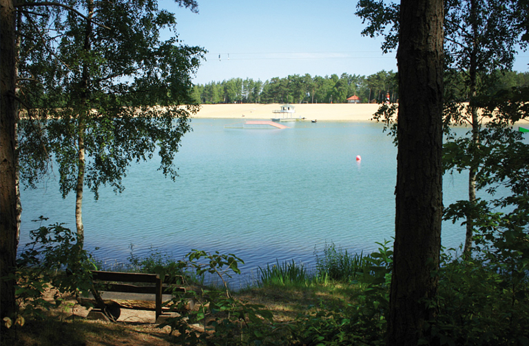 BernsteinSee Pfad um den See